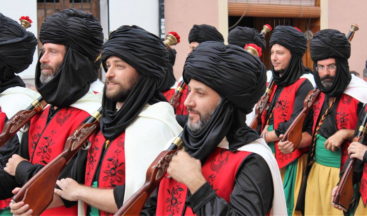 Moros y Cristianos de Pego This is a photography of a Folklore festival in Spain (Wikidata id Q23663045).